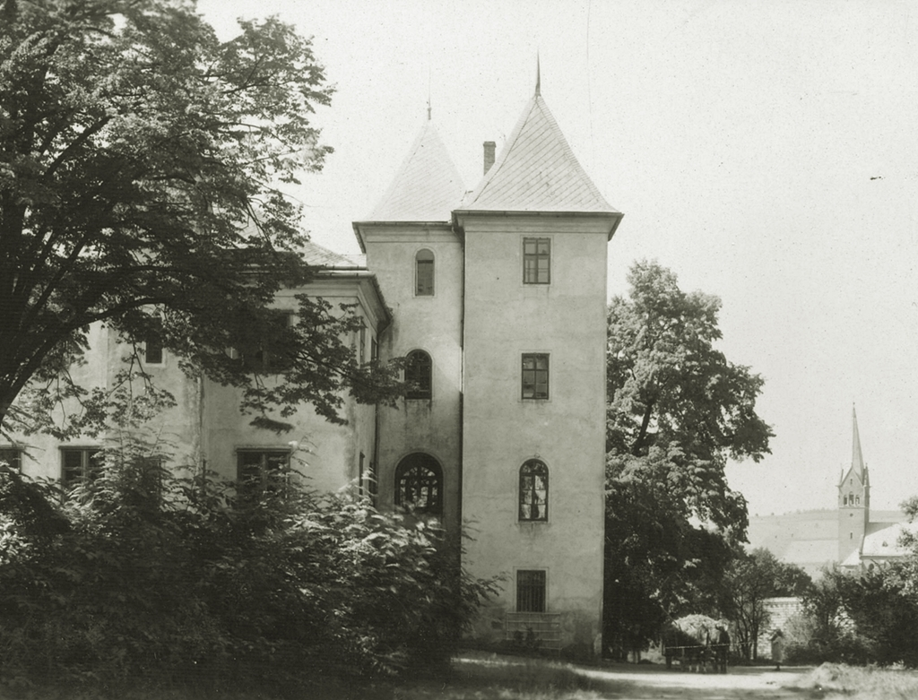 Zamek Grodziec foto archiwalne